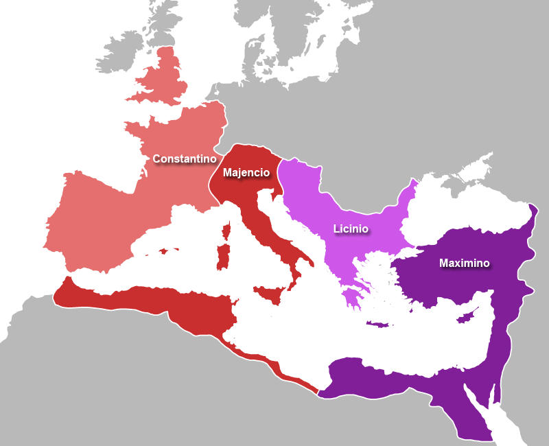 Imperio romano en 311. Territorios correspondientes a los tetrarcas.